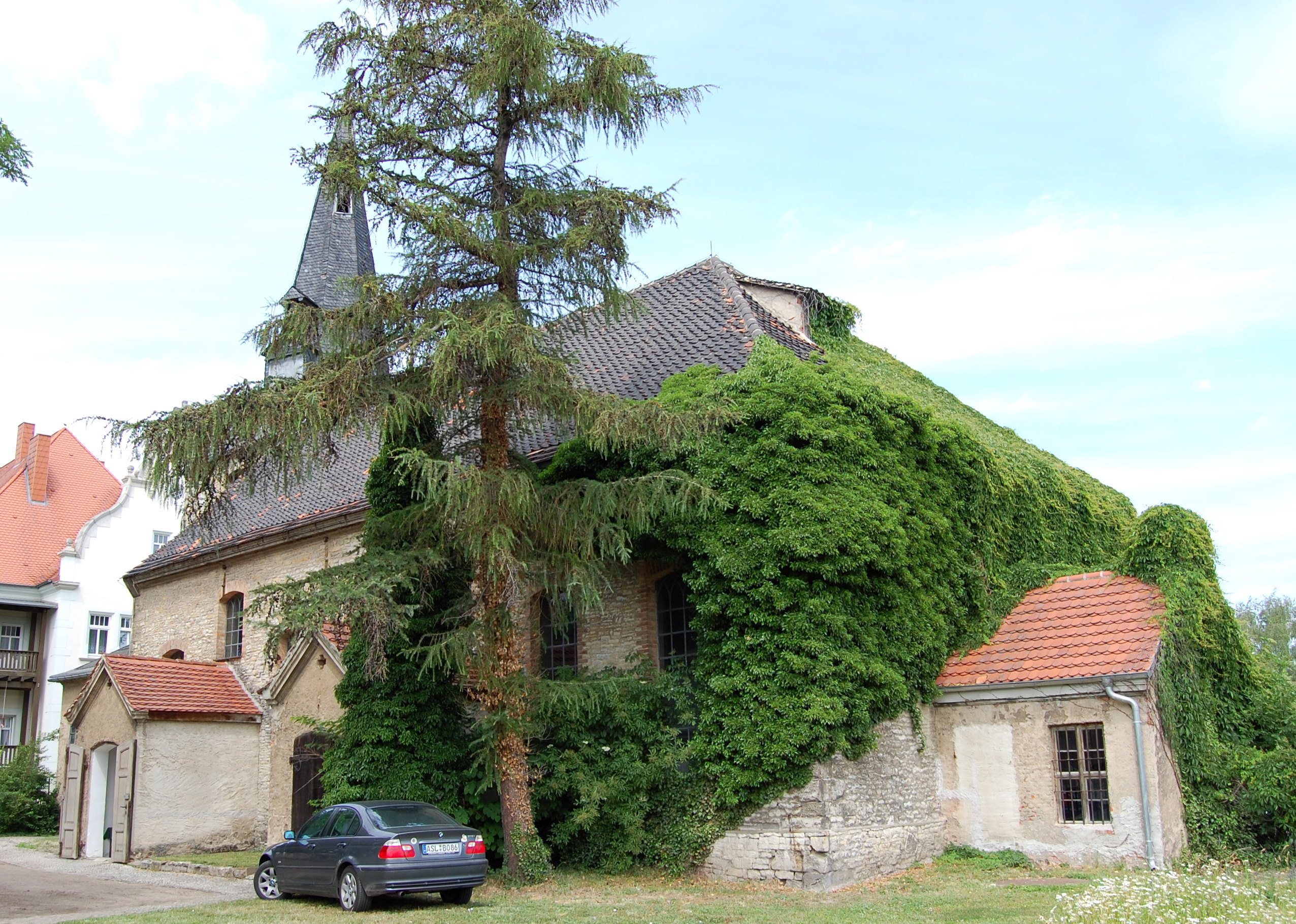 Sankt-Vlemens-Kirche Groß Börnecke, Blick von Südosten